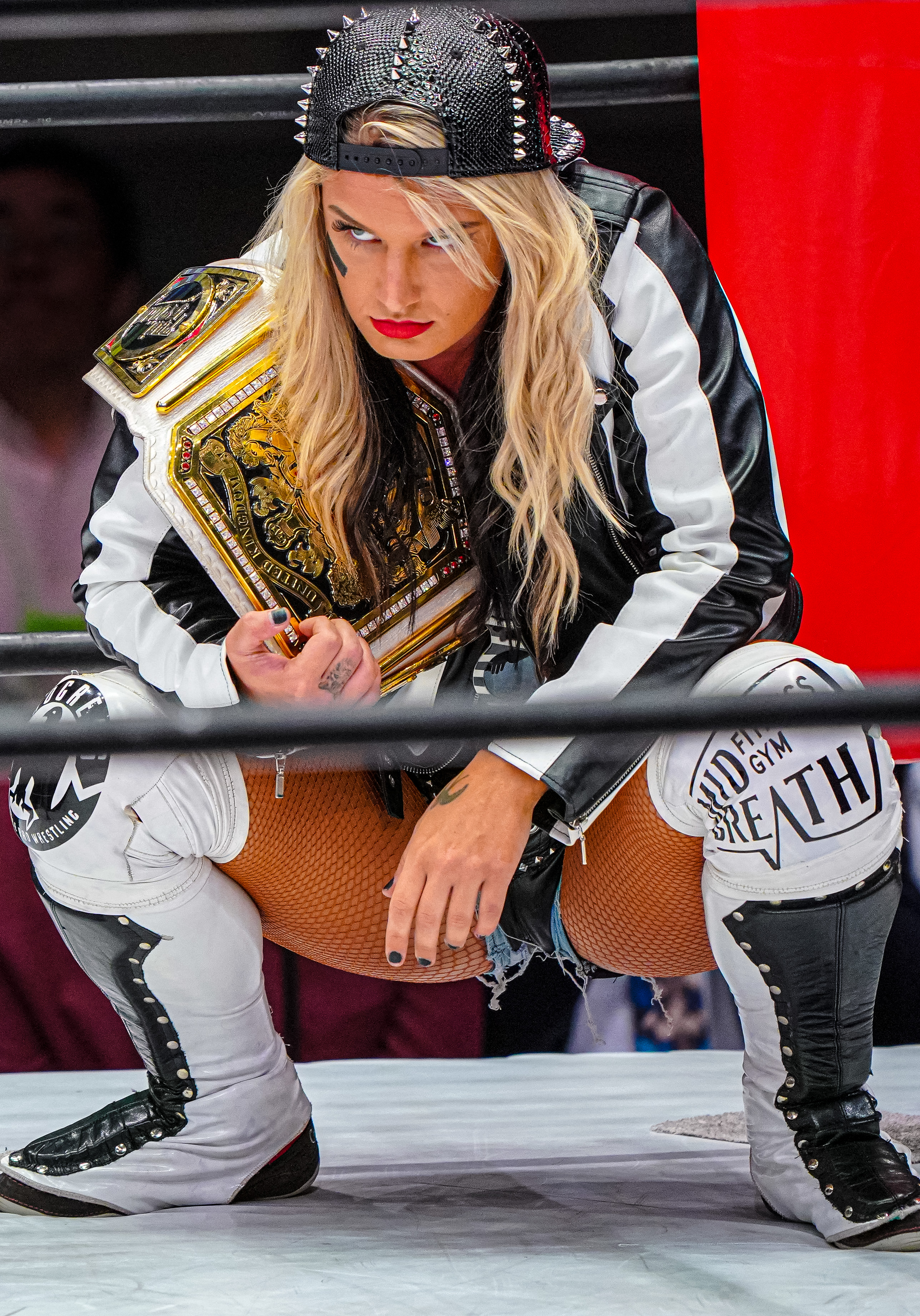 2019.05.16 後楽園ホール